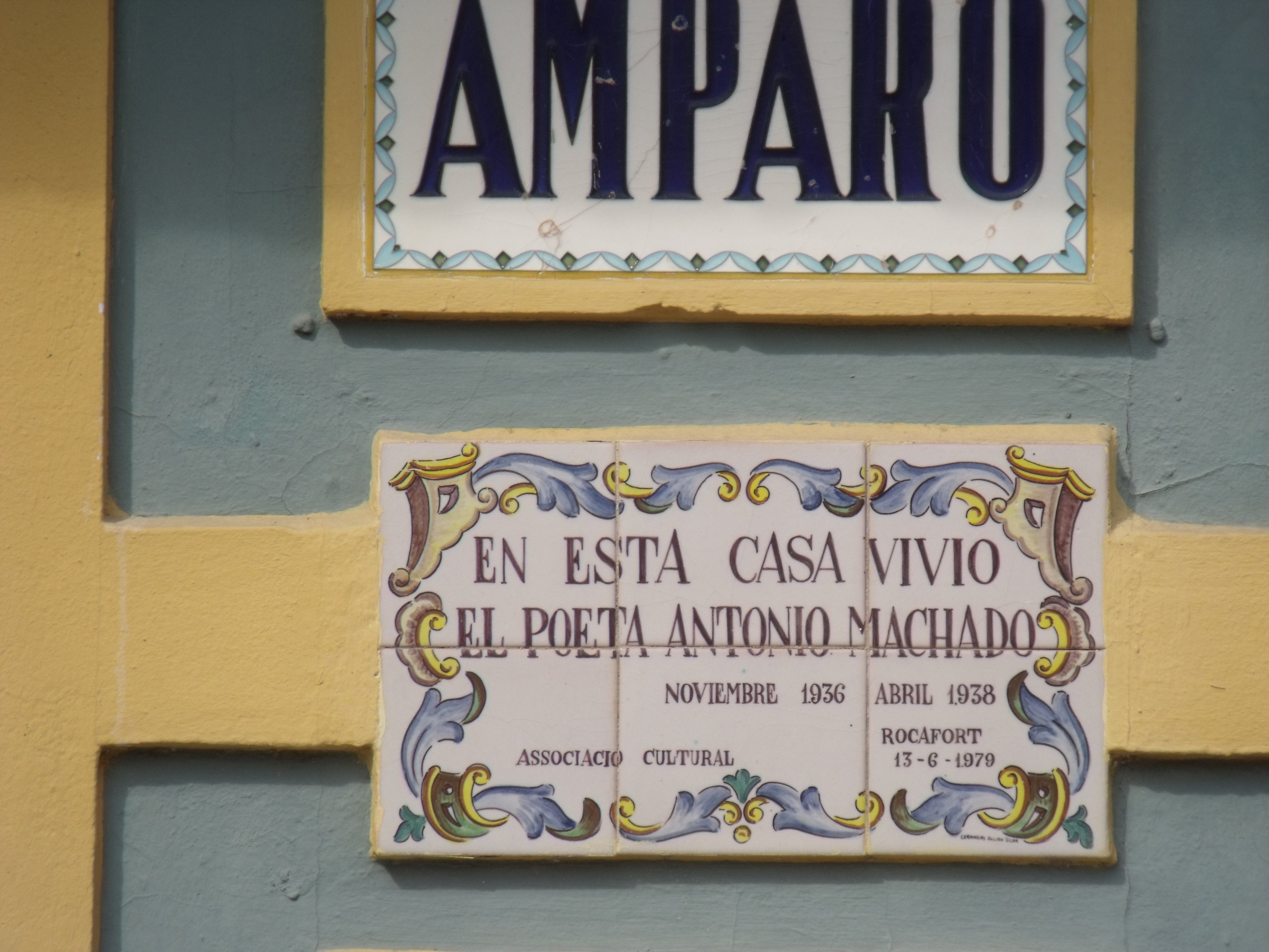 Residencia de Antonio Machado.Detalle del letrero de la puerta.